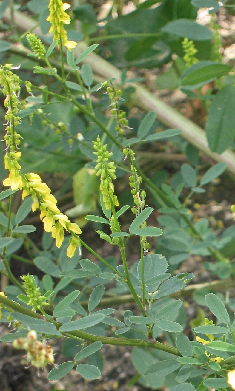 Melilotus officinalis (Citroengele honingklaver bloeiwijze